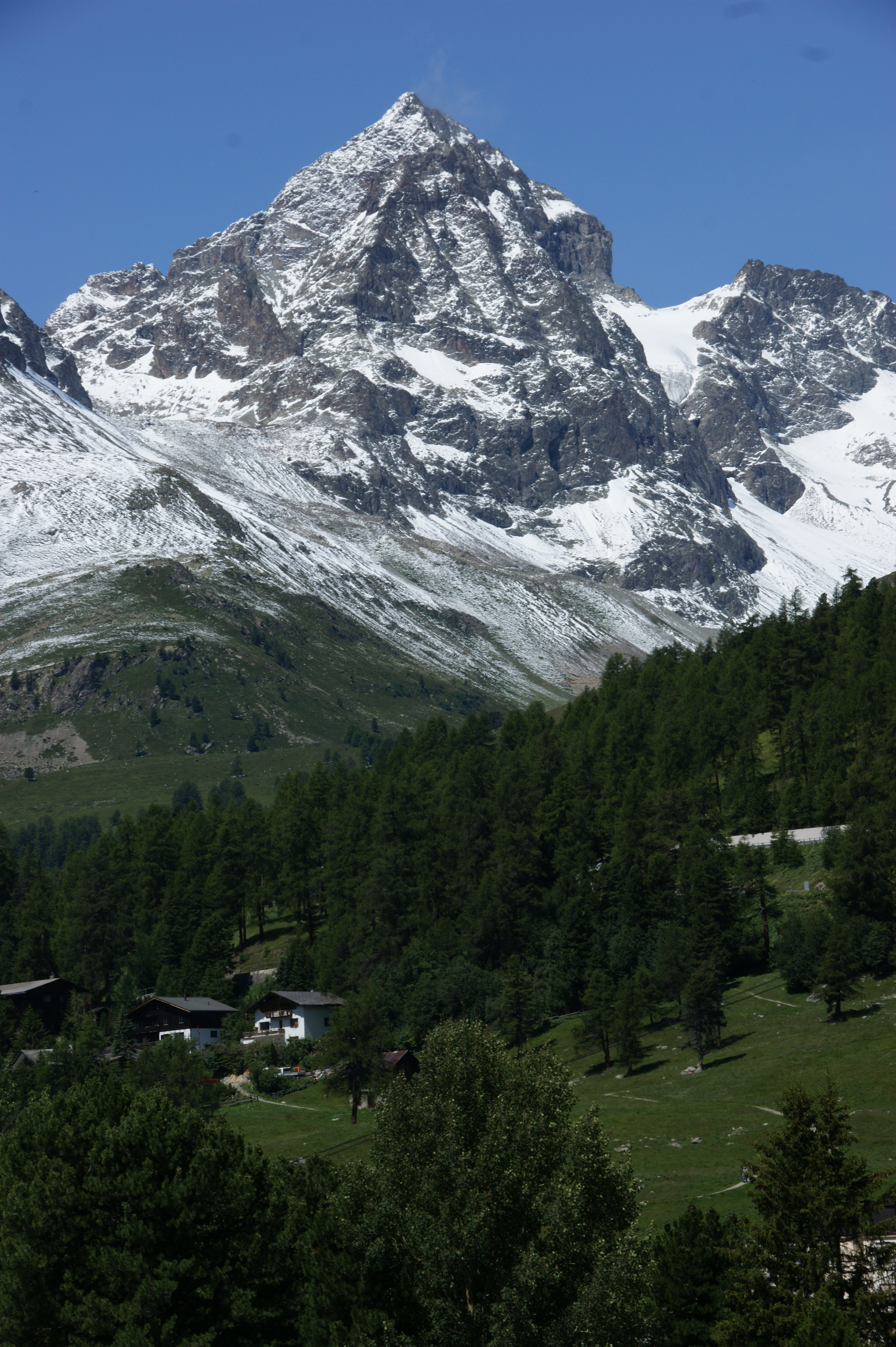 Piz Julier von Osten (St. Moritz) aus gesehen. Der kleine Gletscher ist der Vadret Güglia.